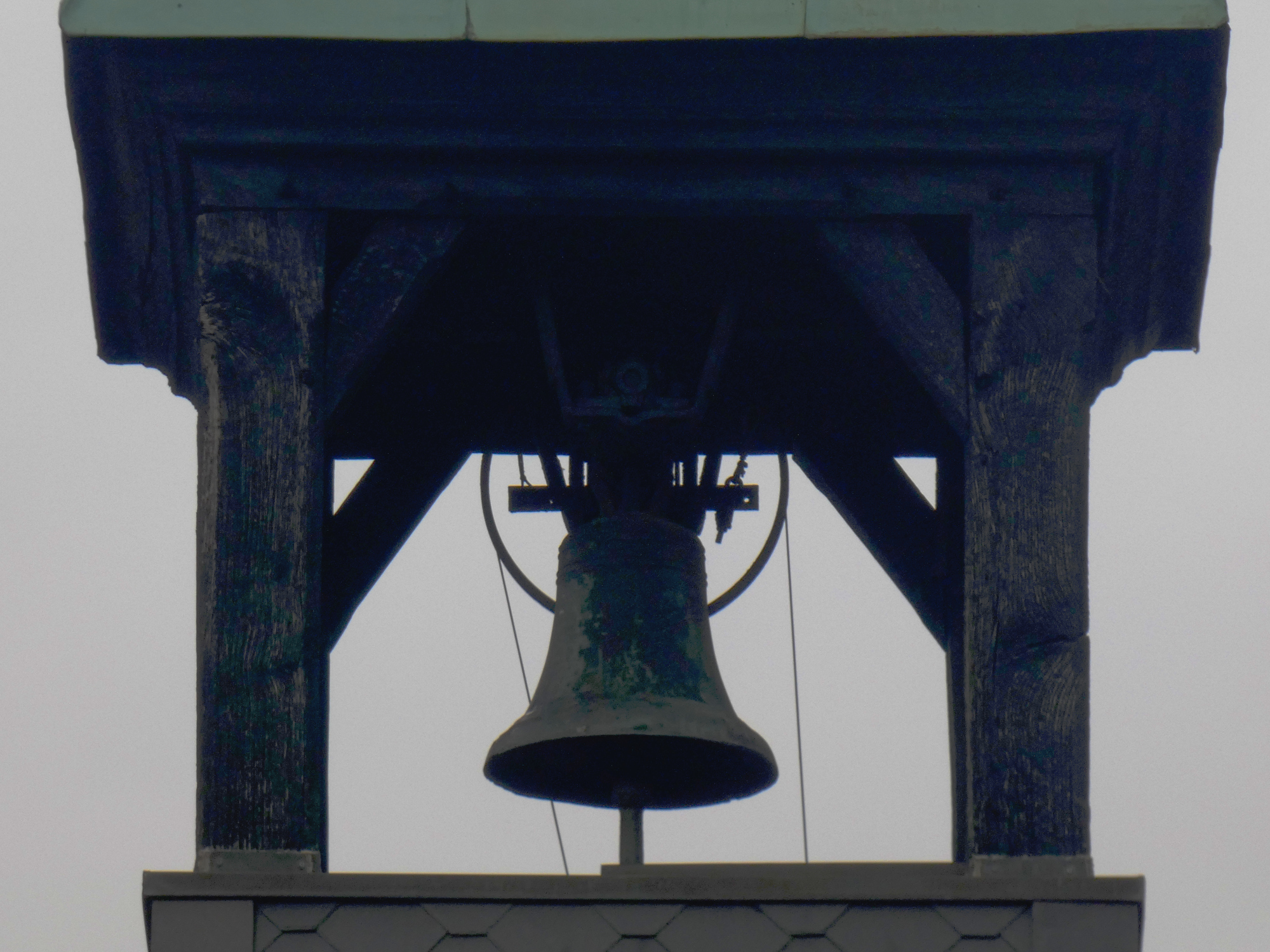 Glocke der Kapelle in Langreder, Stadt Barsinghausen, Region Hannover, Niedersachsen